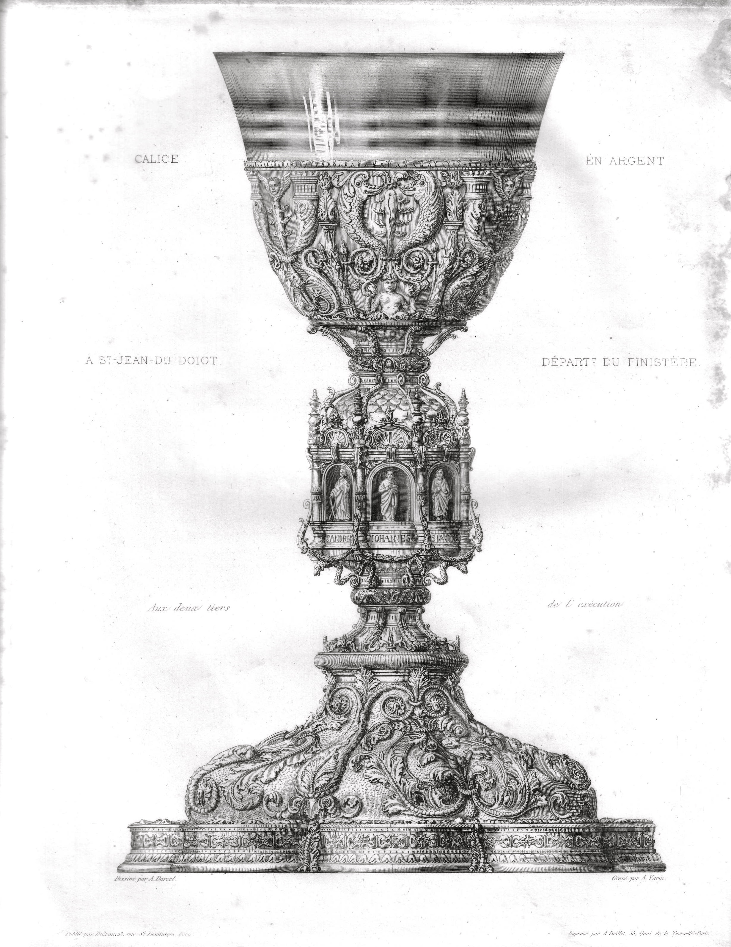 Dessin effectué en 1860 par A.Darcel, gravé par A.Varin.